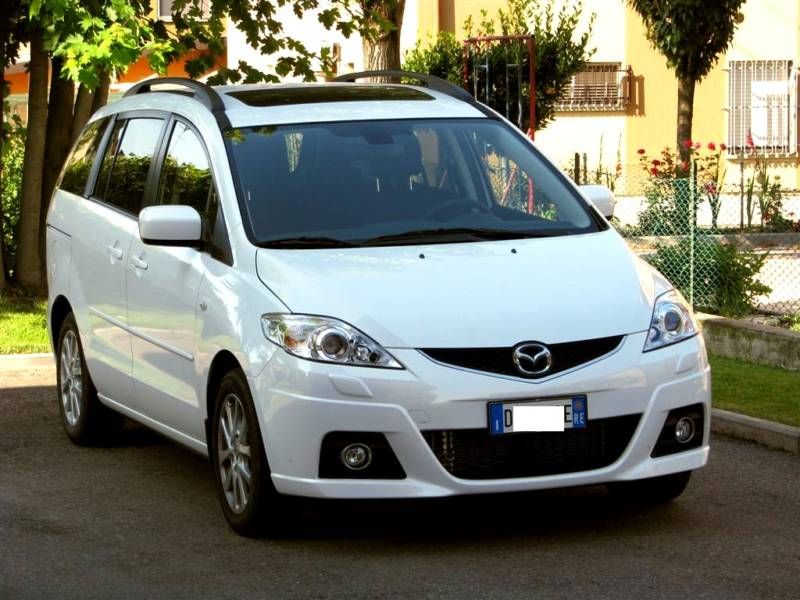 Auto MAZDA5 Versione TOP